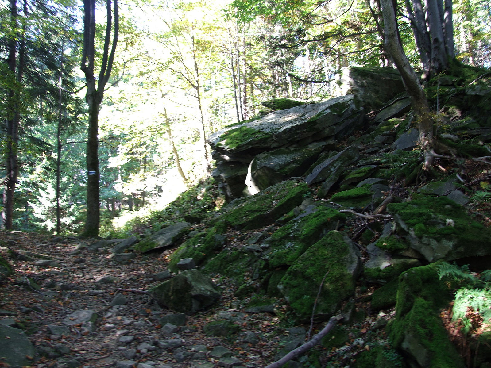 Wietrzne Dziury (Beskid Sądecki, pół=nocny grzbiet Przehyby)